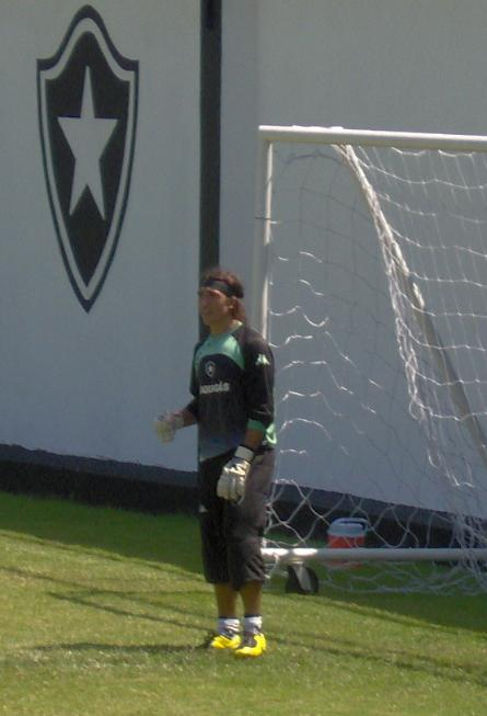 Juan Castillo, goleiro uruguaio treinando pelo Botafogo, do Brasil.